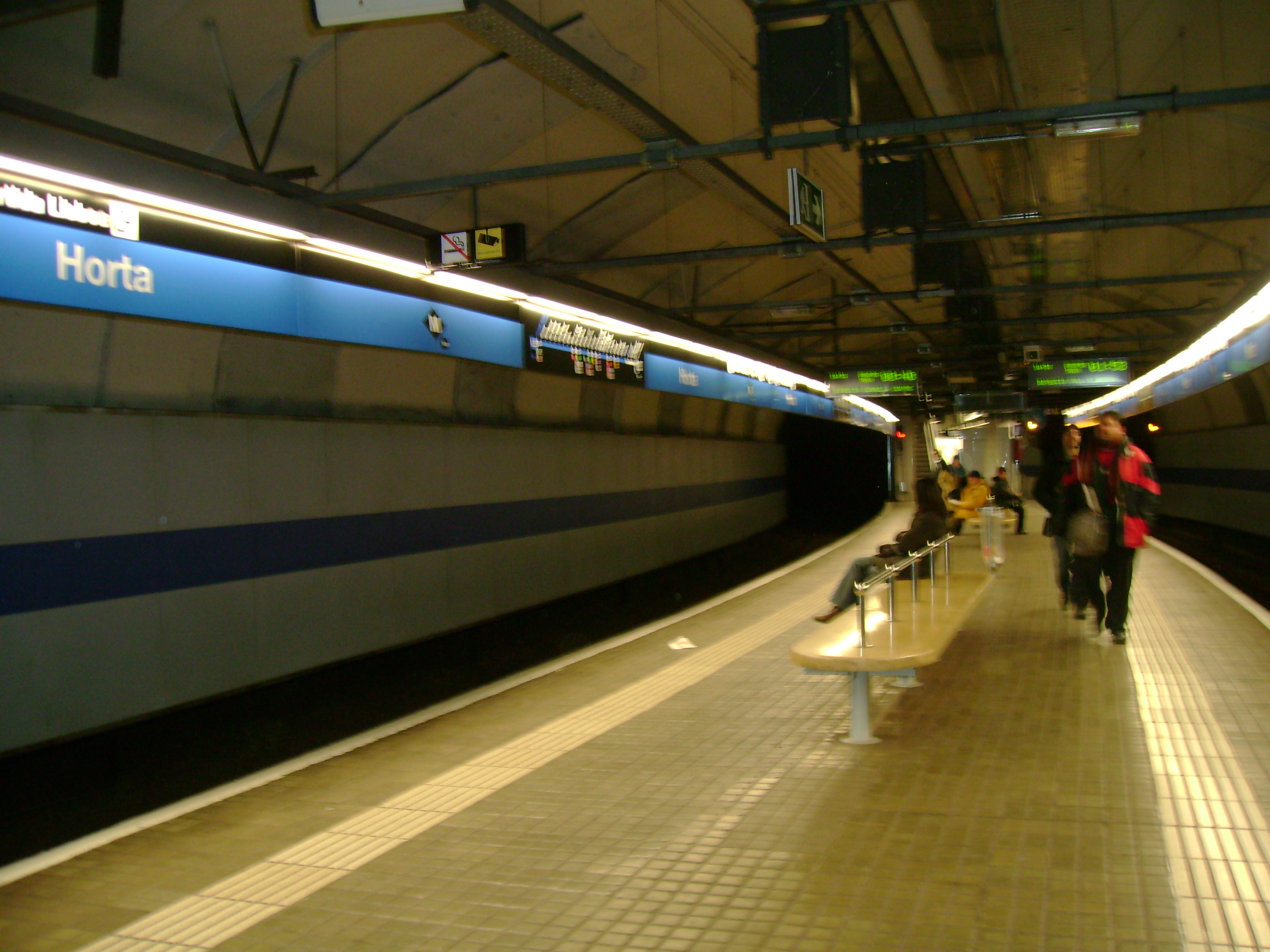 Foto capturada per la meva càmara a l'estació d'Horta (Metro de Barcelona).